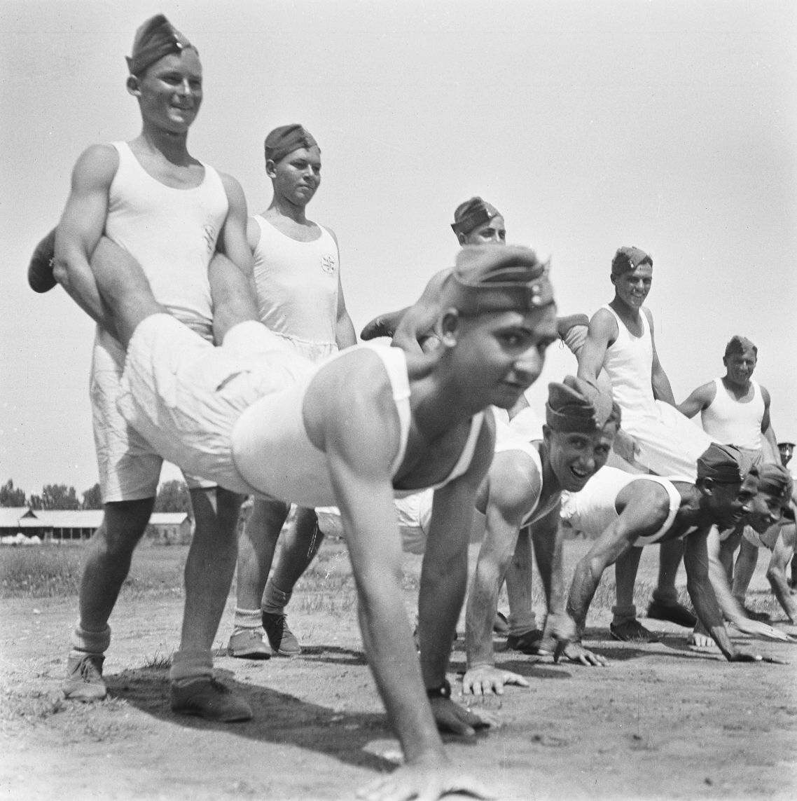 אוסף צילומים של הצלם זולטן קלוגר טווח מספרי התשלילים 18160 - 18250: Buffs, Company 18- באפס, פלוגה 18, פלוגת ה"מכבי".